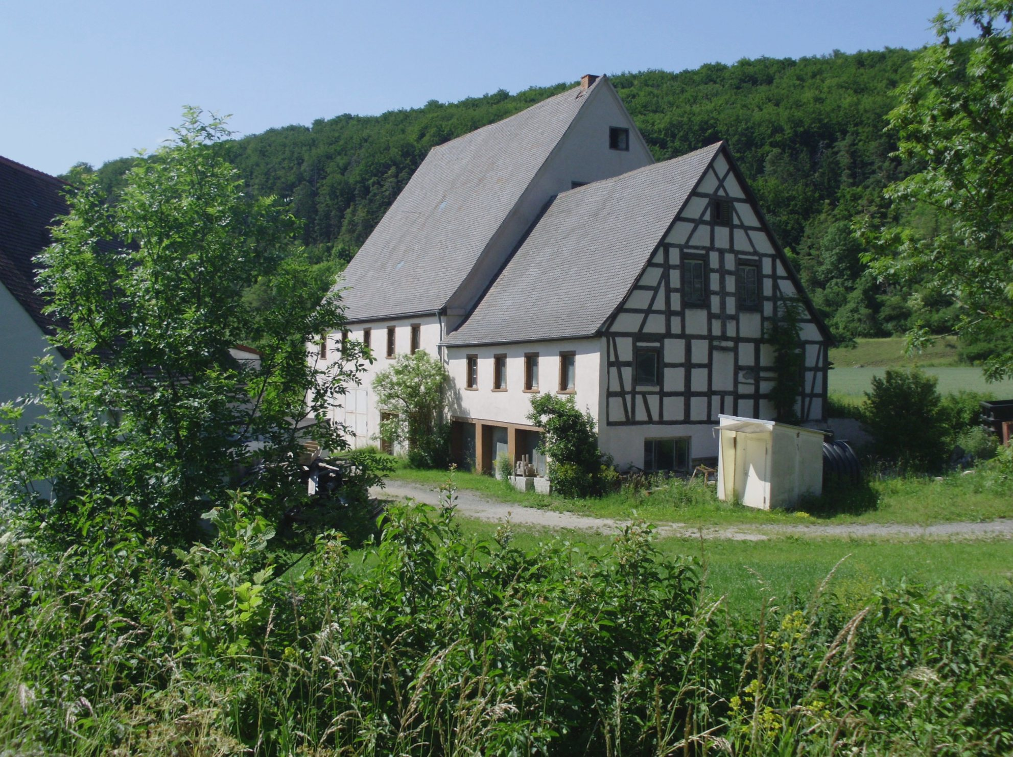 Obere Papiermühle, Ortsteil von Treuchtlingen im Landkreis Weißenburg-Gunzenhausen